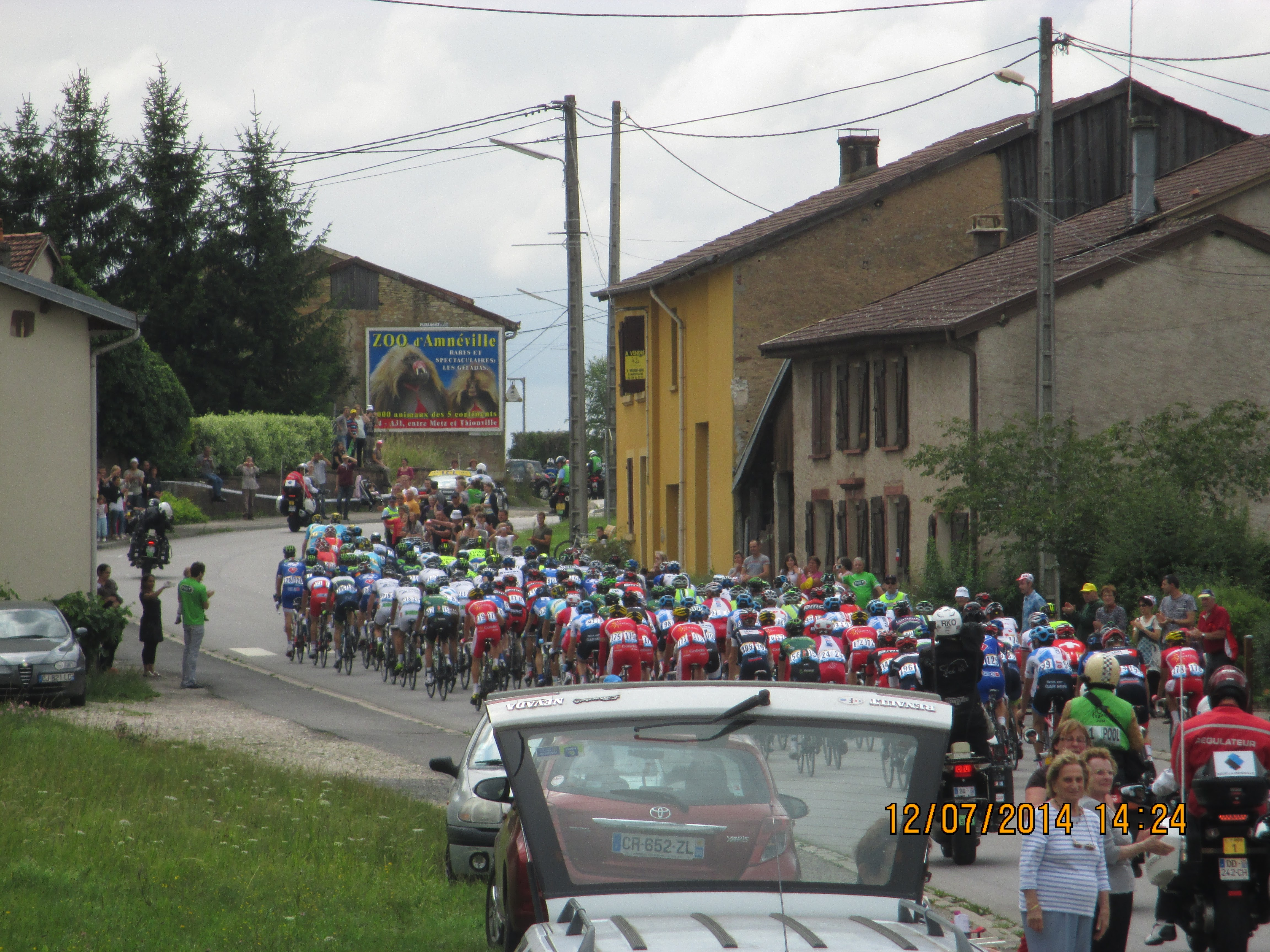 Vomécourt (88700) - France - Tour de France Cycliste 2014